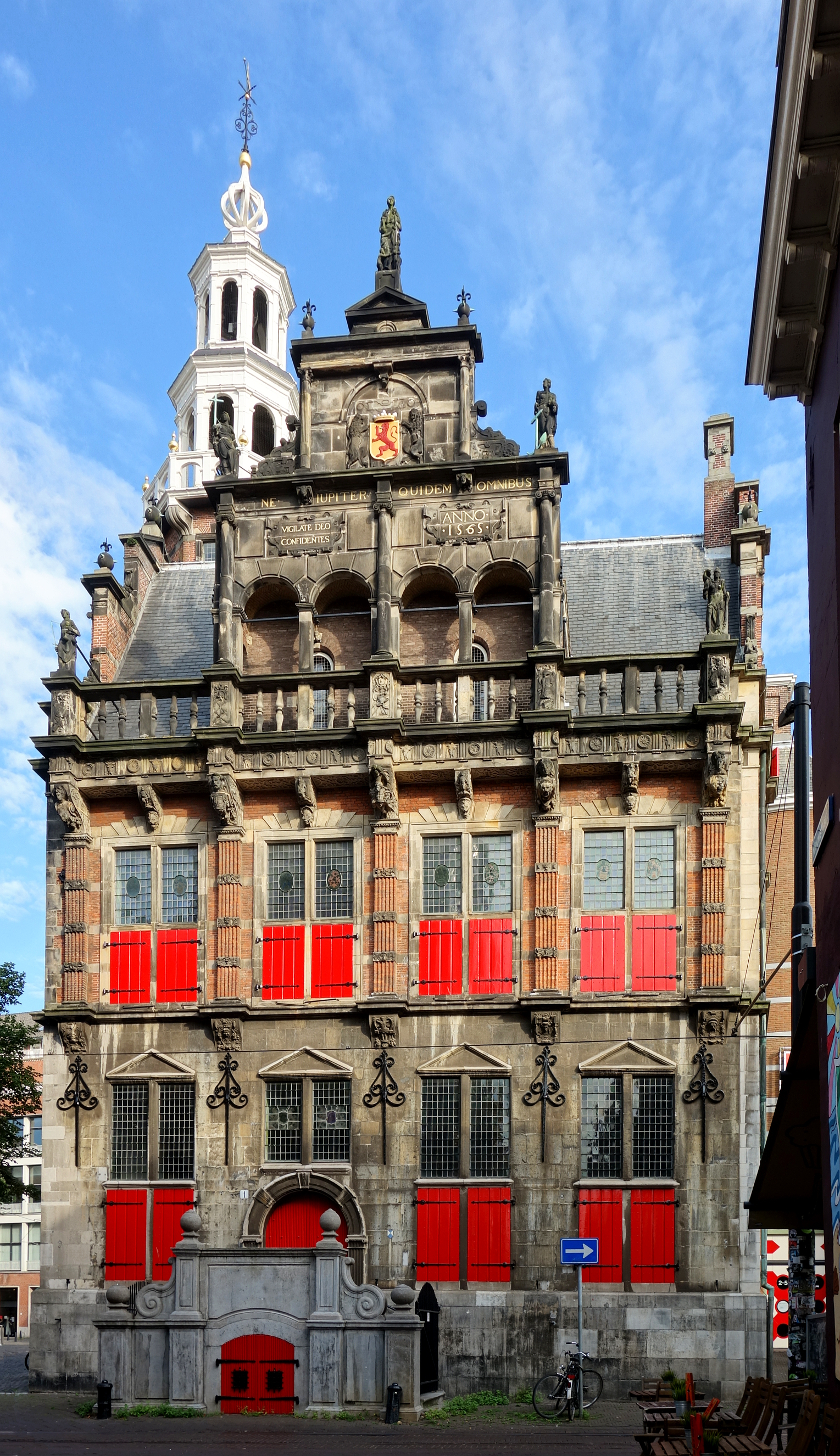 L'ancien hôtel de ville de La Haye.